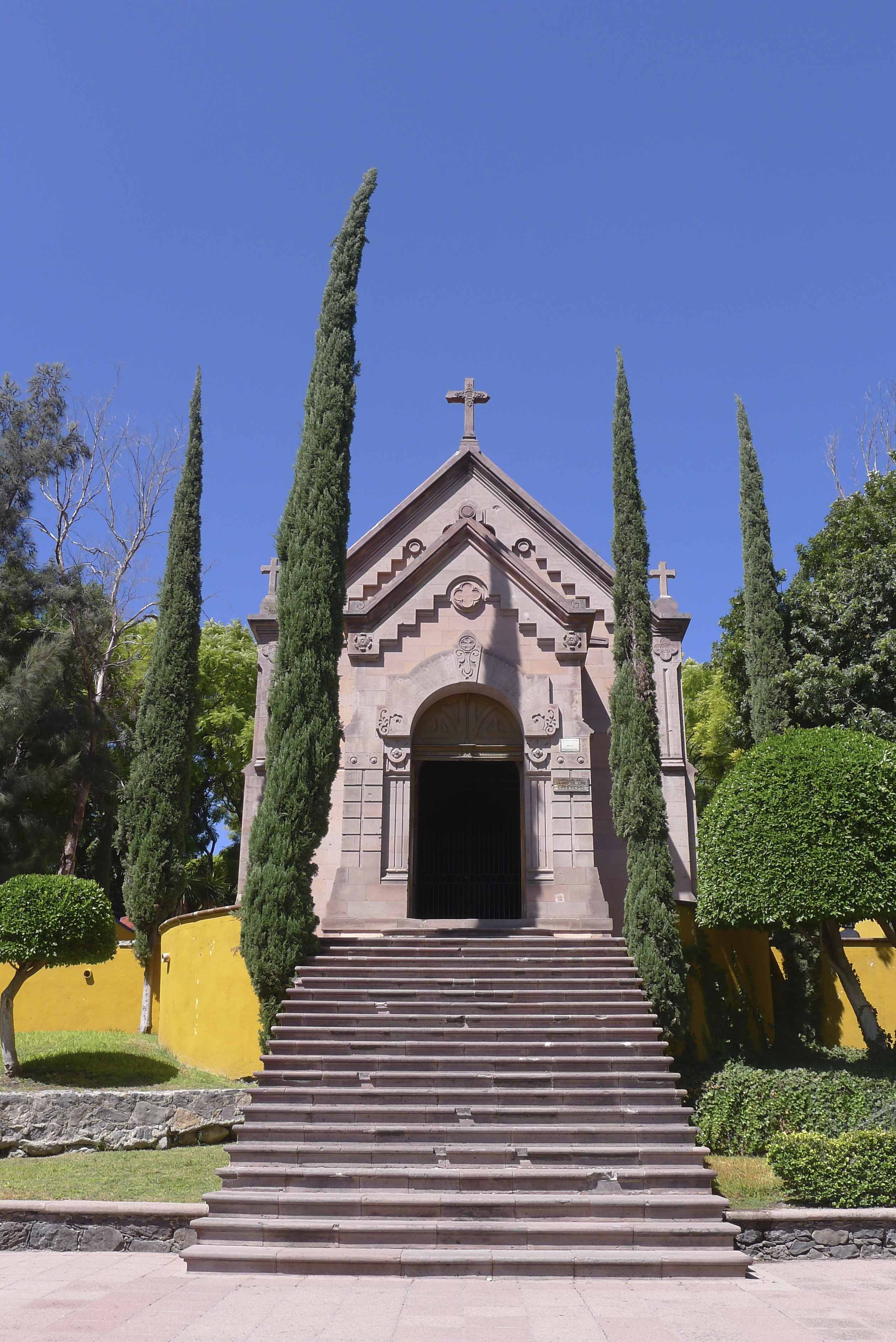 Capilla de Maximiliano de Habsburgo en el Cerro de las Campanas, Santiago de Queretaro